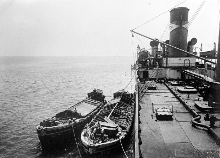 Repronegatief. Melasseboot zuigt de lichters leeg op de rede, N.V. Pure Cane Molasses Comp, Semarang